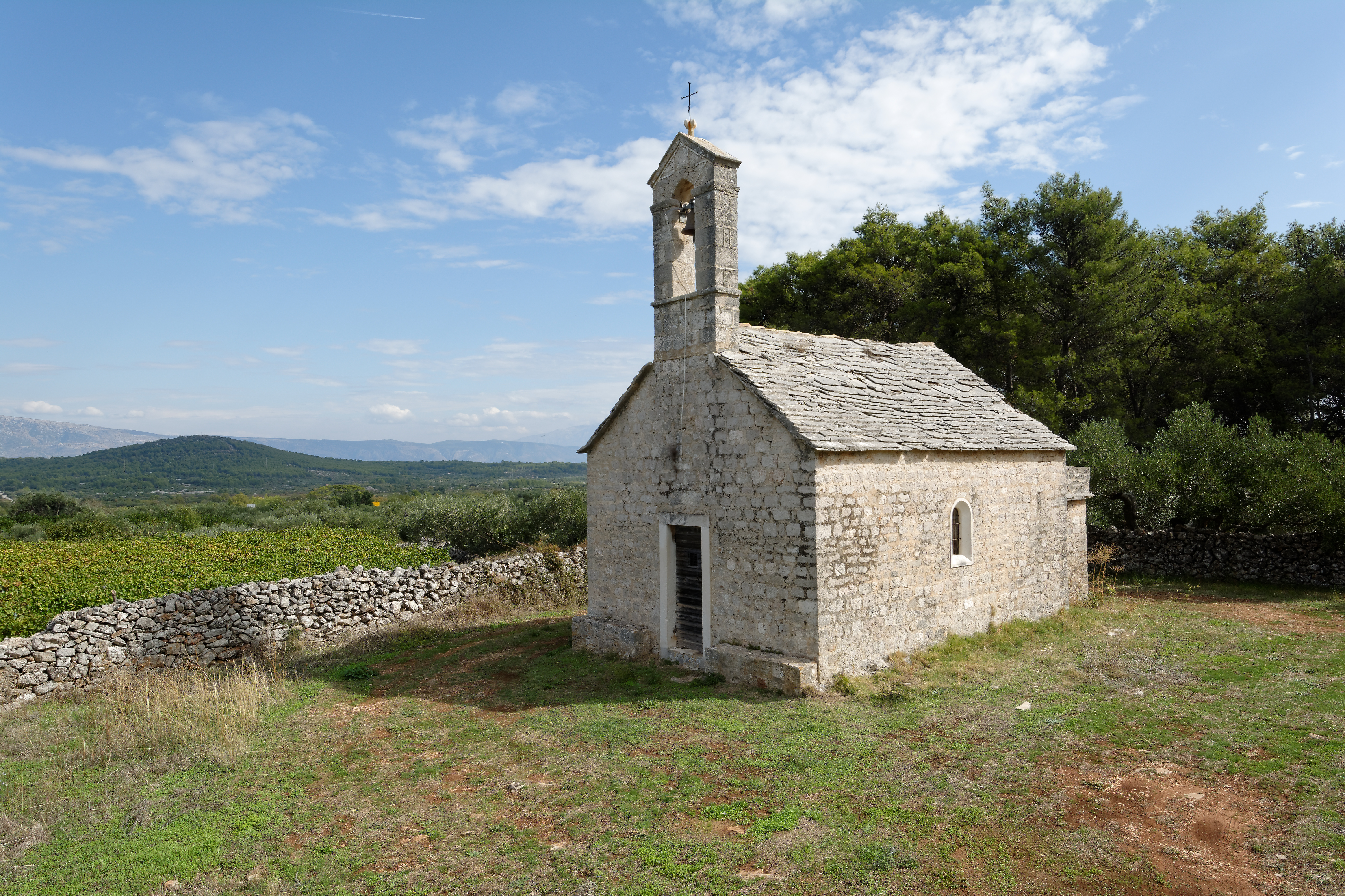 Kaple svatého Kosmy a Damiána, Vrbanj, ostrov Hvar